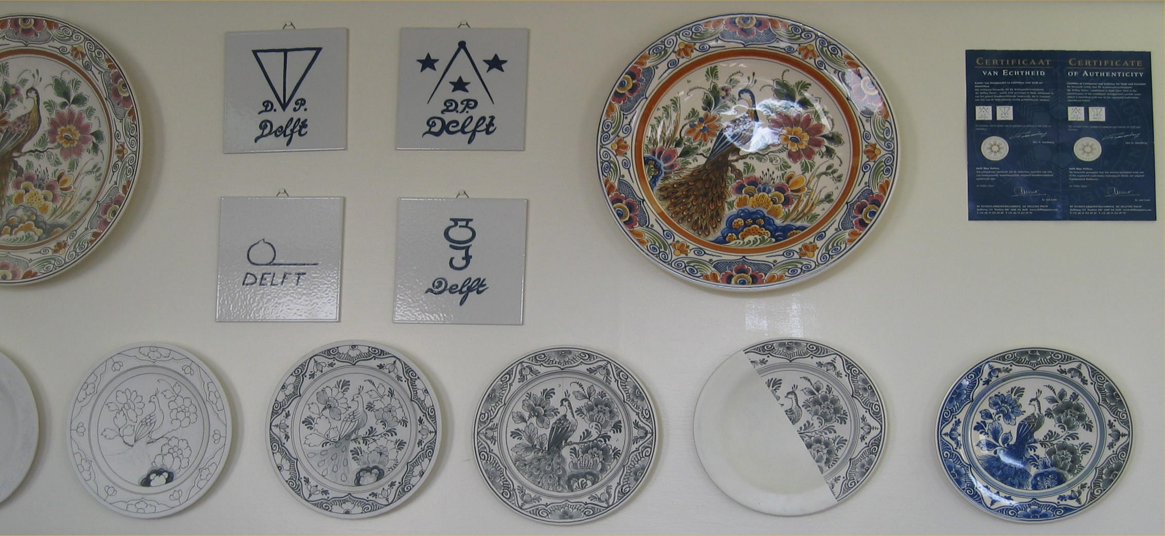 Utvikling av illustrasjoner på Delft-porselen